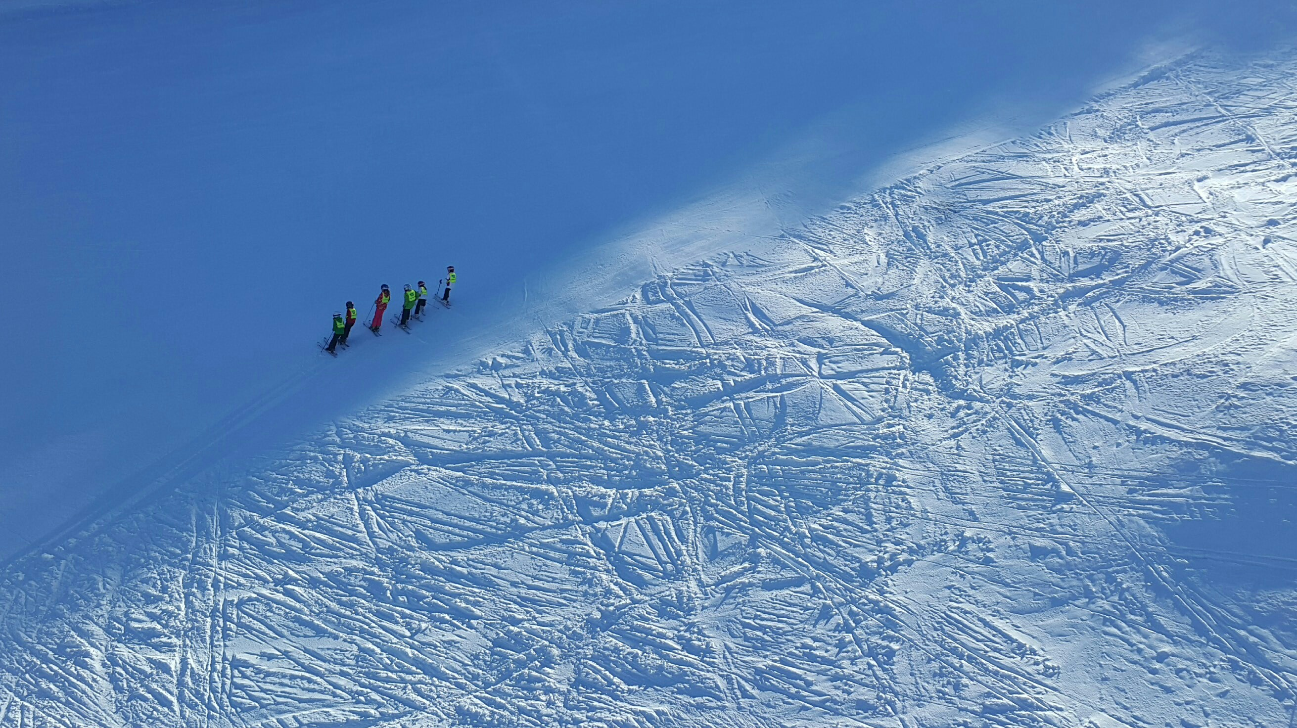 Mauntain Zlatibor at National park Zlatibor, Serbia